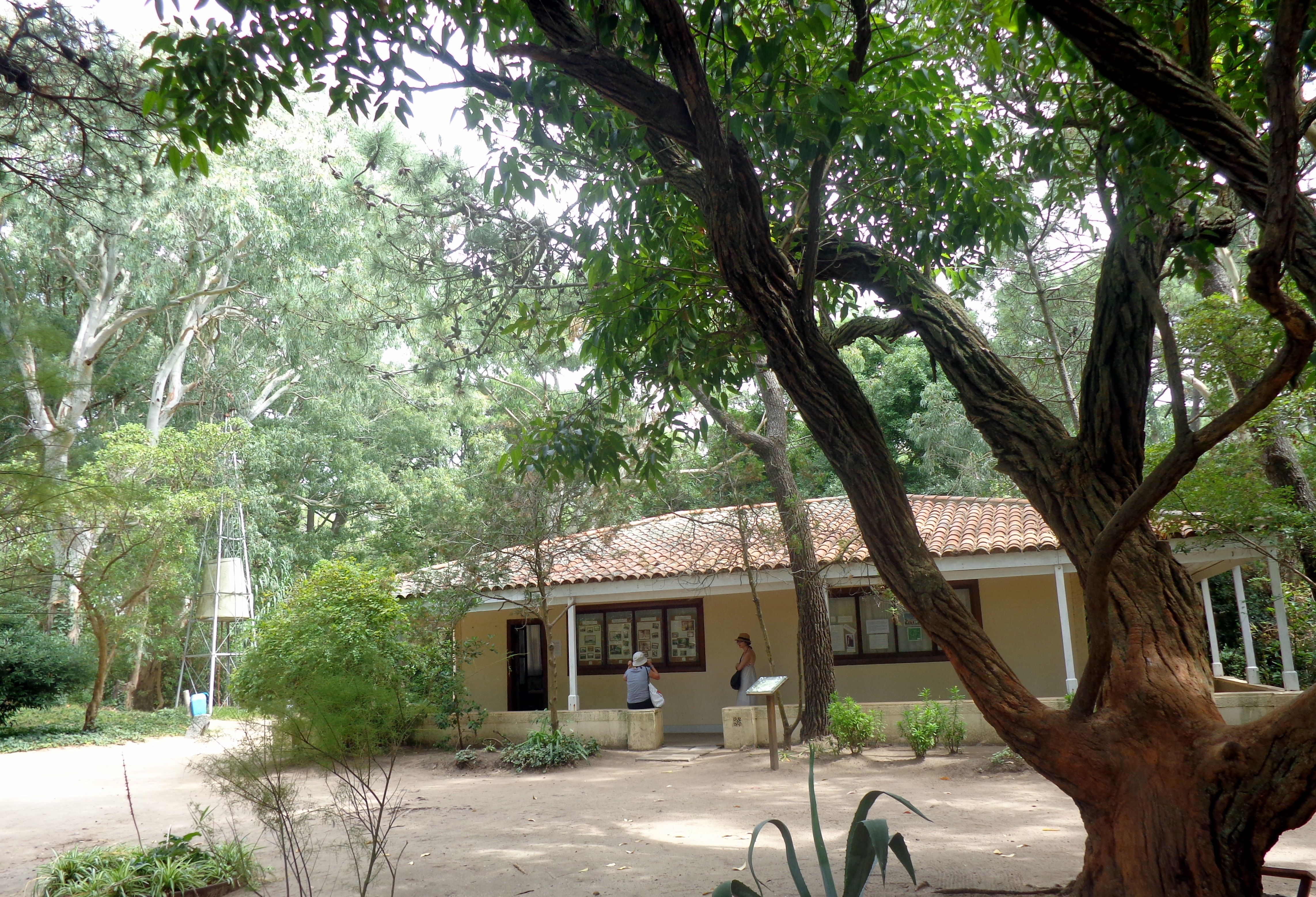 Casa de Gesell y eucalipto africano. En Villa Gesell, Provincia de Buenos Aires, Argentina.